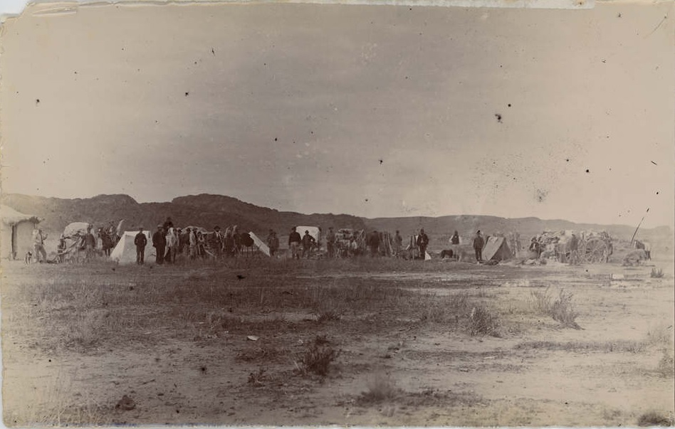 El Campamento Villegas fue bautizado así por el Colonel Villegas, un oficial que desempeñó un papel clave en la campaña militar del gobierno argentino contra los indios nativos al principio de la década de 1880. Fotografía realizada por John Murray Thomas (1847-1924).